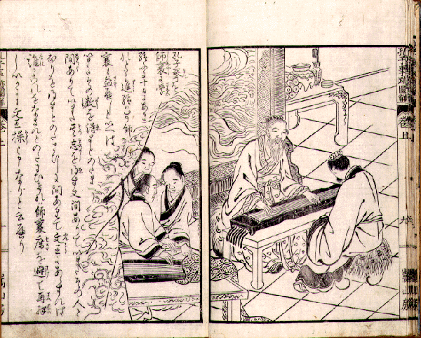 Confucius, Edo period in Japan